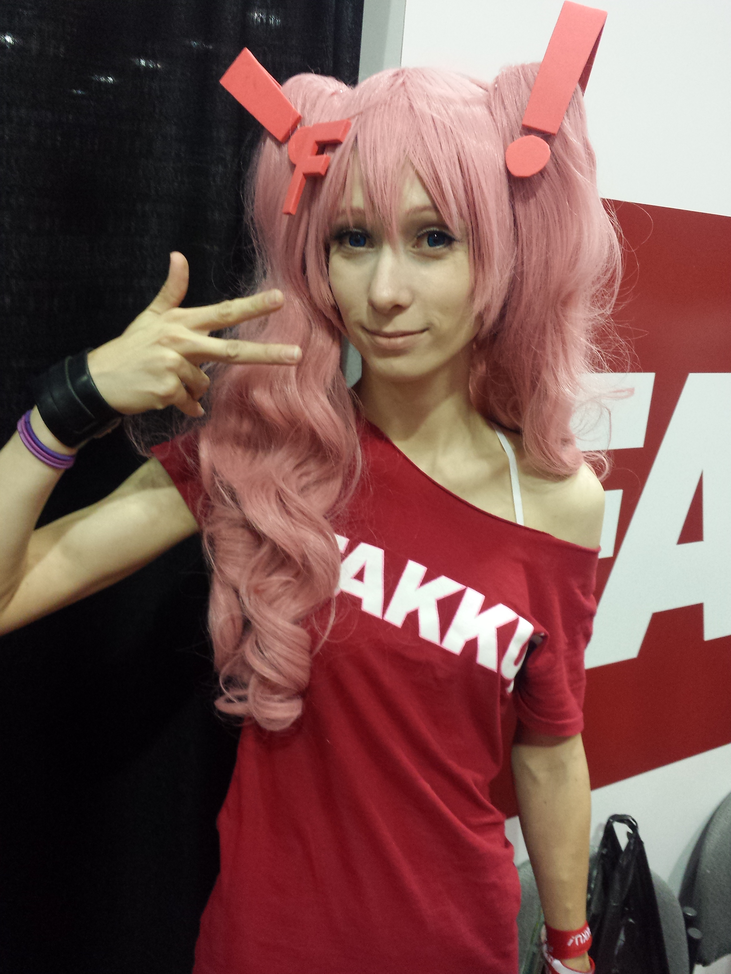 Cosplay at Anime Expo 2015